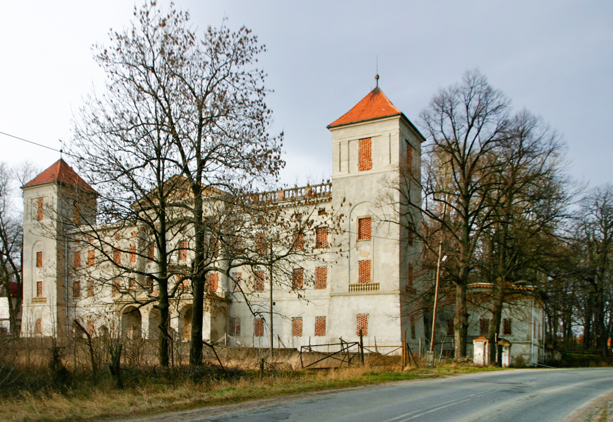 Kluczowa – wieś w Polsce położona w województwie dolnośląskim, w powiecie ząbkowickim, w gminie Ząbkowice Śląskie.